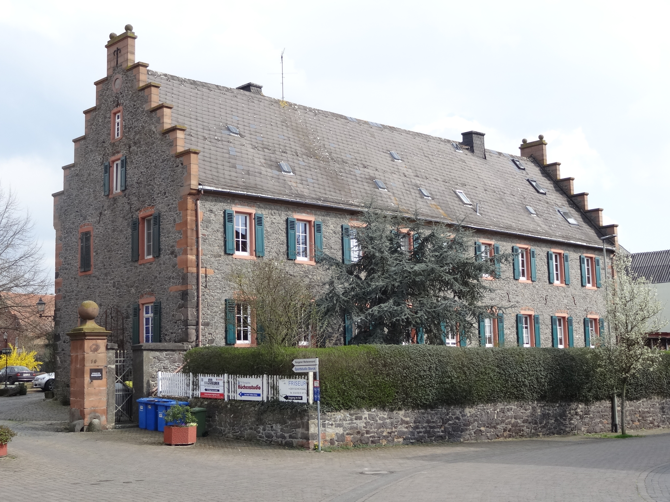 Weedstraße 16 (Utphe)